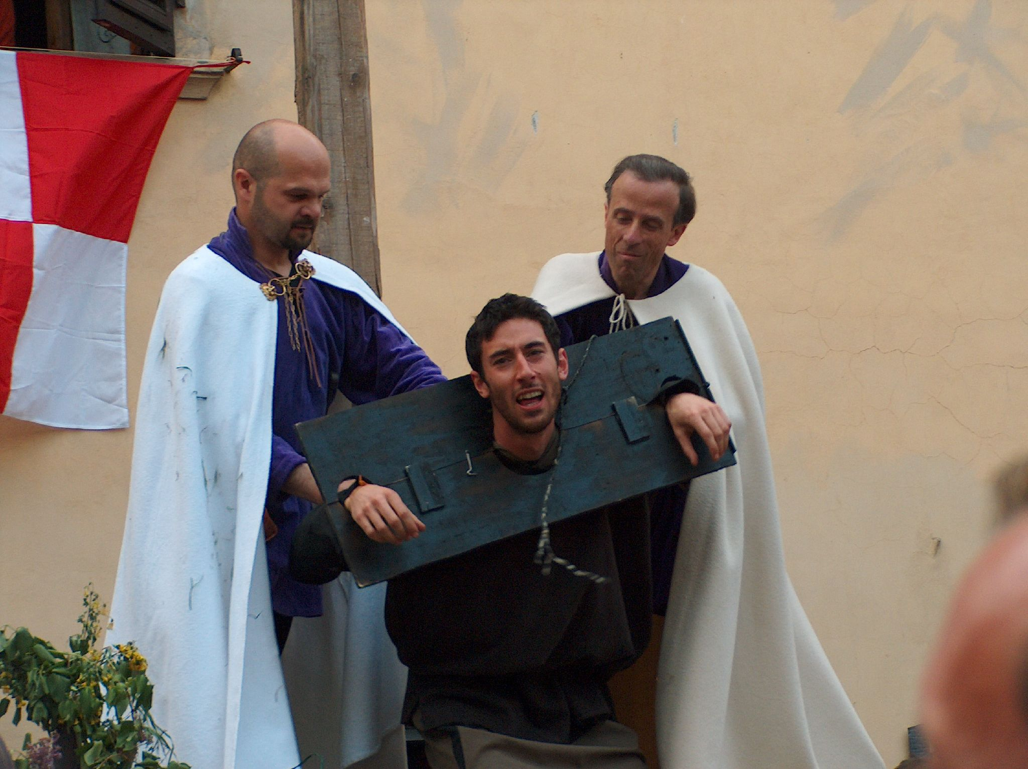 Festa della Stagion Bona - Panzano in Chianti